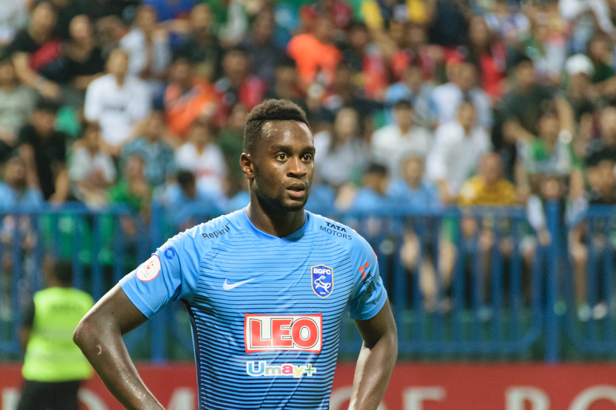 Frédéric Mendy (footballer, born 1988)